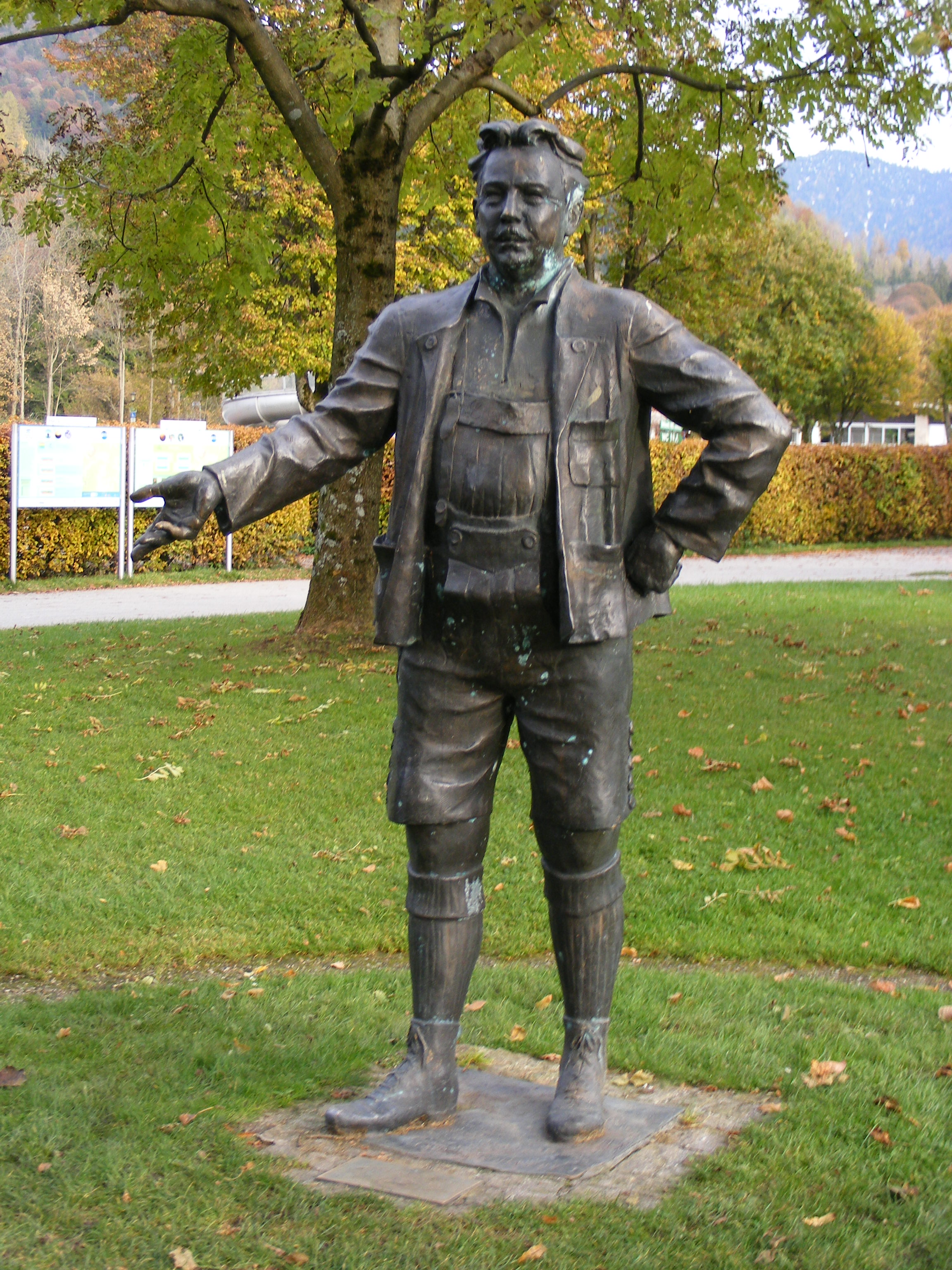 Skulptur von Leo Slezak in Rottach-Egern im Kurpark. Künstler: Quirin Roth, Gmund.